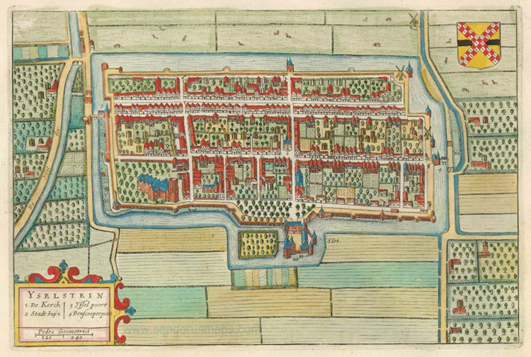 title=Yselstein; size=1/4 x 38 x 50